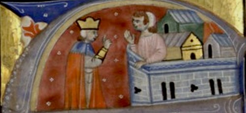 Bohémond Ier et Tancrède